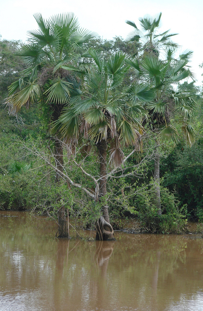 Vegetación endemica de sabana, Aw (invierno seco) según la clasificación climática de Köppen.